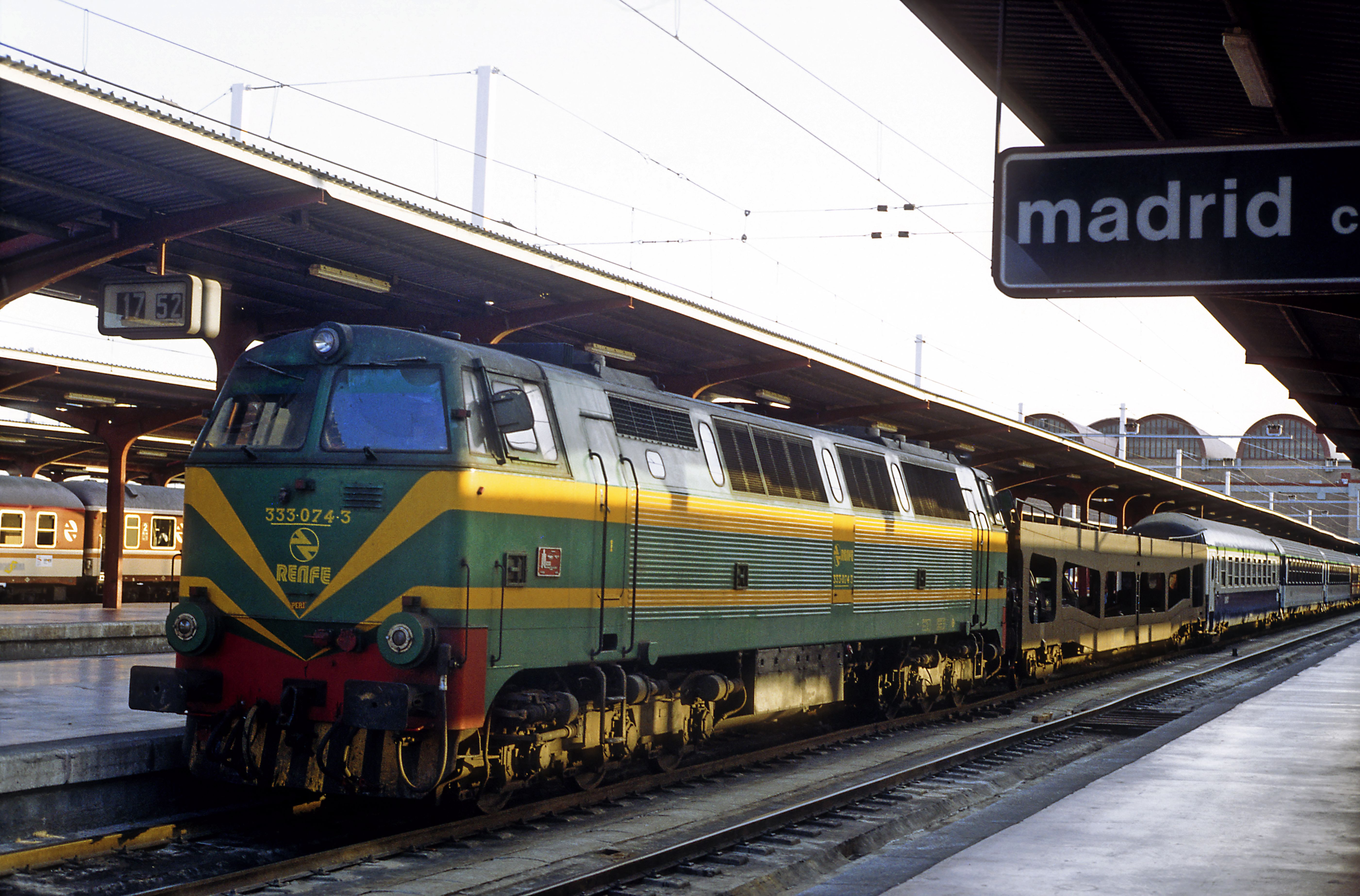 333 074 mit Nachtzug 302 »La Puerta del Sol«, einem der wenigen durchlaufenden Züge nach Frankreich und der letzte, der aus Regelfahrzeugen gebildet wurde.